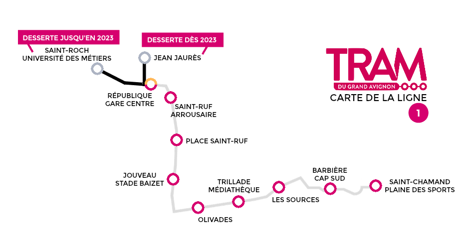 Tracé de la ligne 1 du Tramway d'Avignon - TRAM du Grand Avignon avec les nouveaux noms de stations